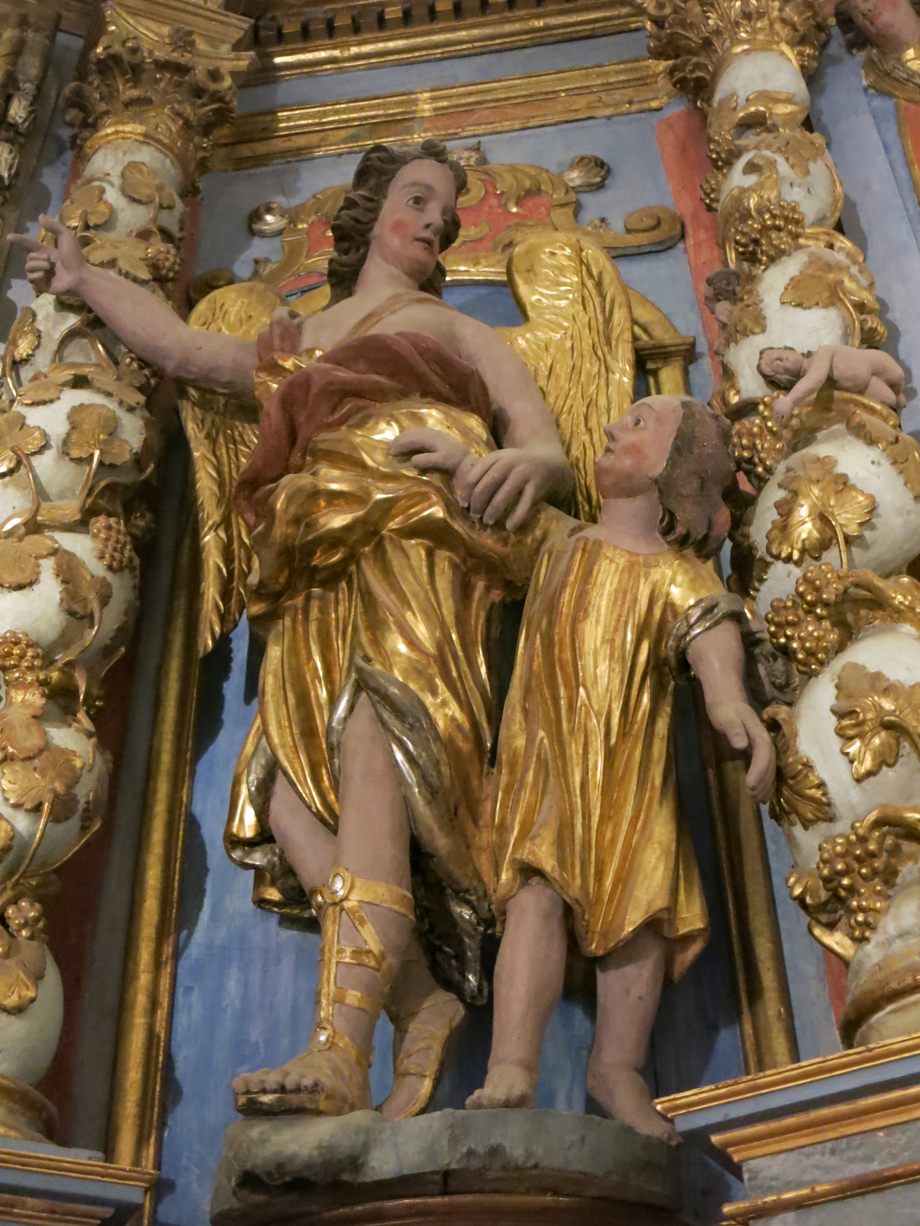 Détail du retable de Saint-Michel de Montaner (18e siècle)